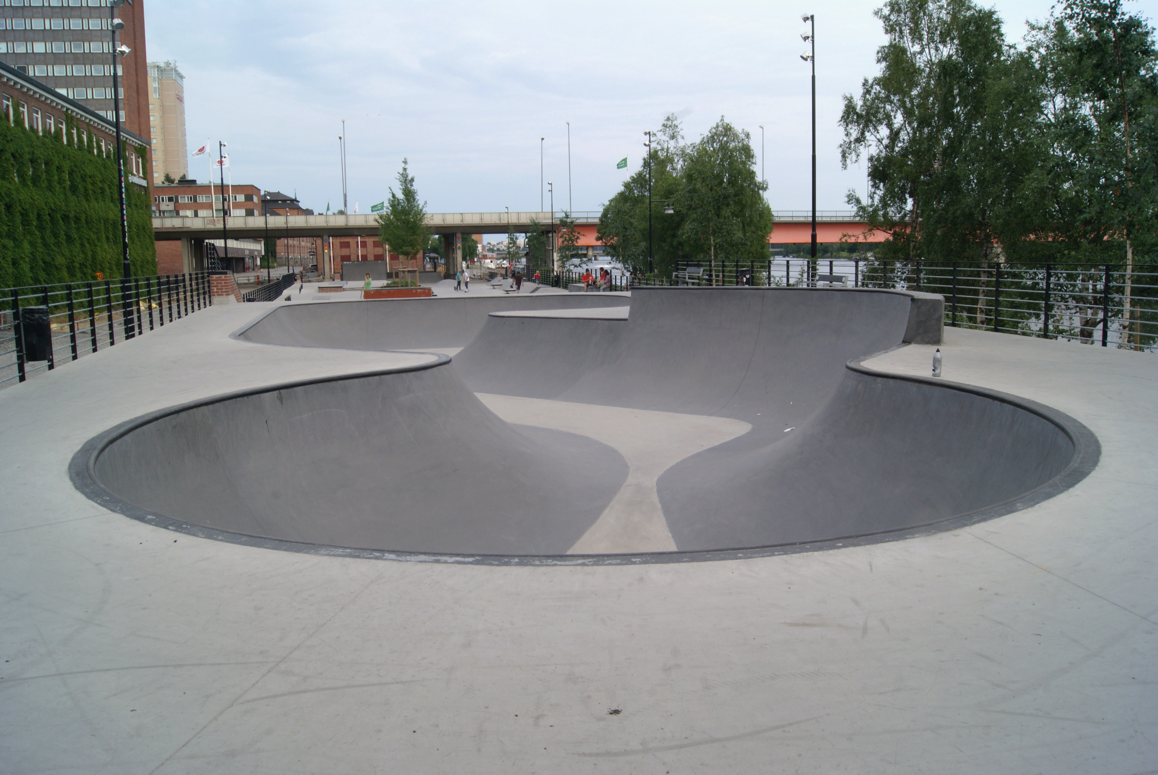 Sparken är en skatepark för skatebord, BMX och inlines i Umeå, bredvid Umeälven och Hamnmagasinet Unknown